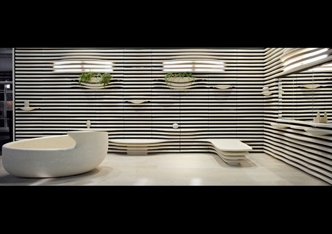 MARMOMACC 3